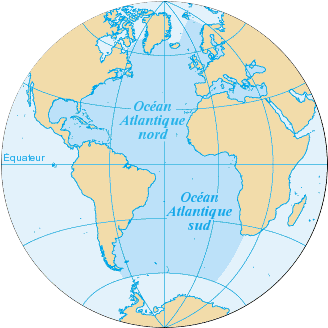 Carte de l'océan Atlantique détourée.